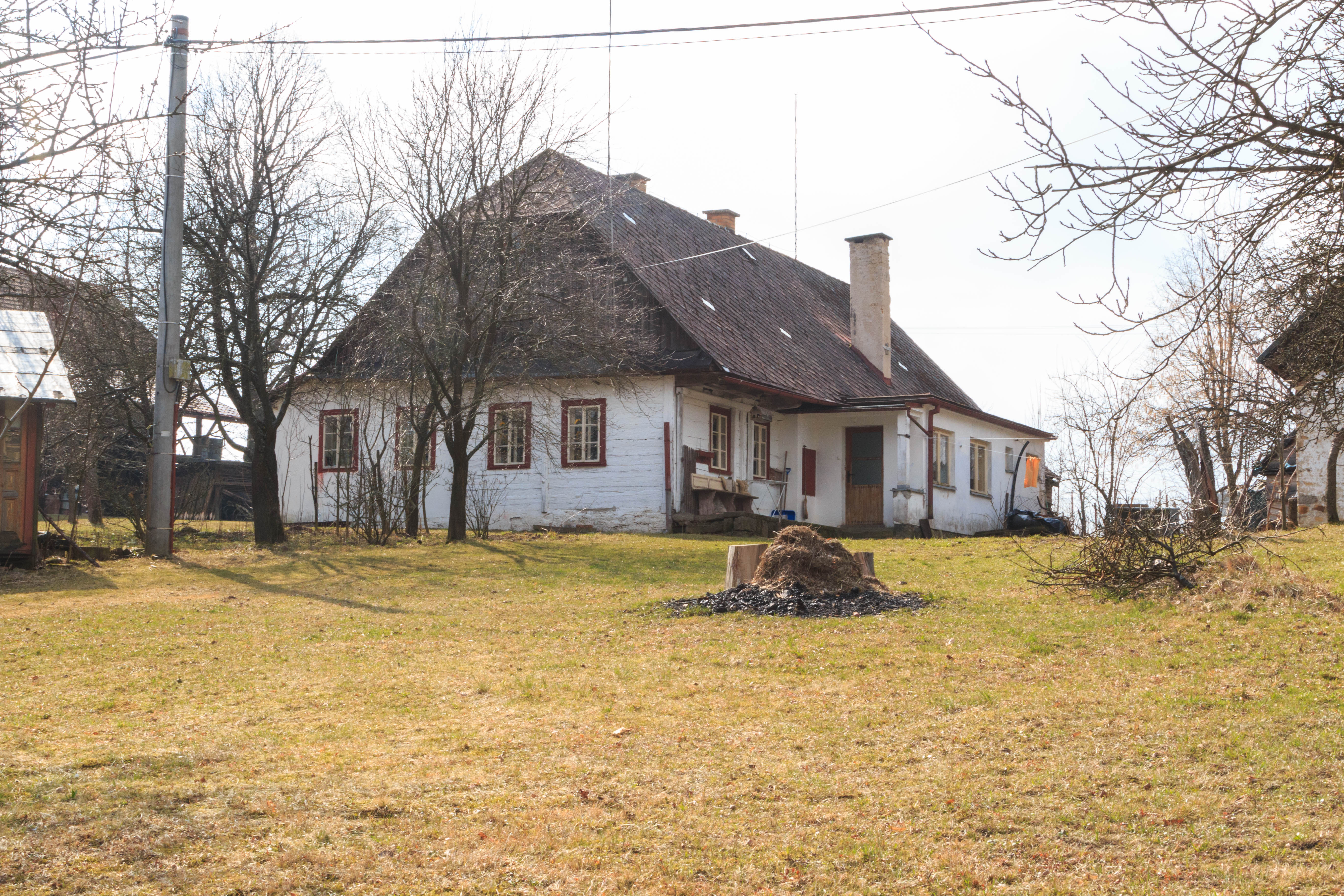 Přím u Javornice - čp. 4